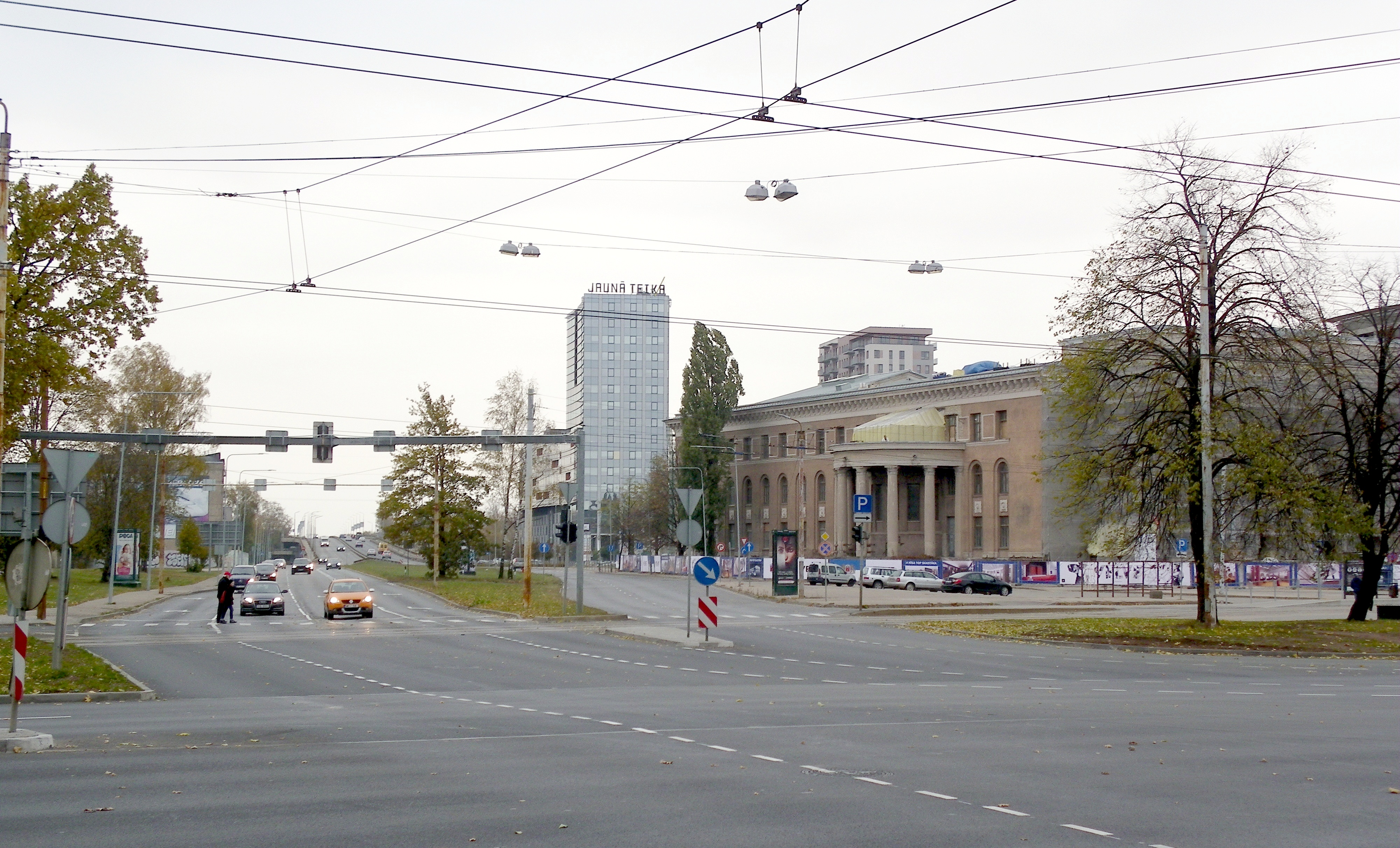 Gustava Zemgala gatve no krustojuma ar Brīvības gatvi (Čiekurkalna virzienā)